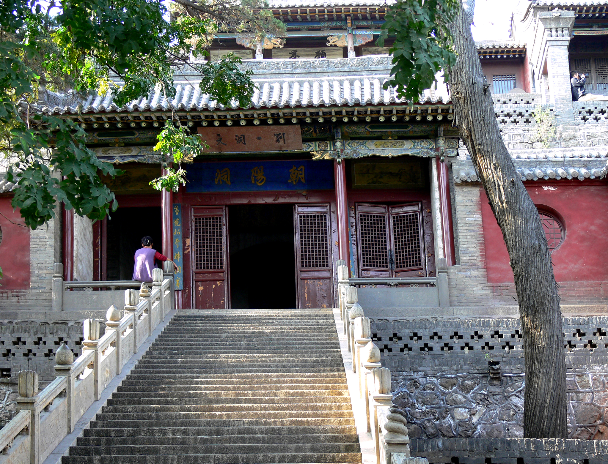 晋祠朝阳洞